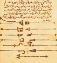 Əbülqasim Zəhravi. “Əl-məqələtus-səlasim” 1